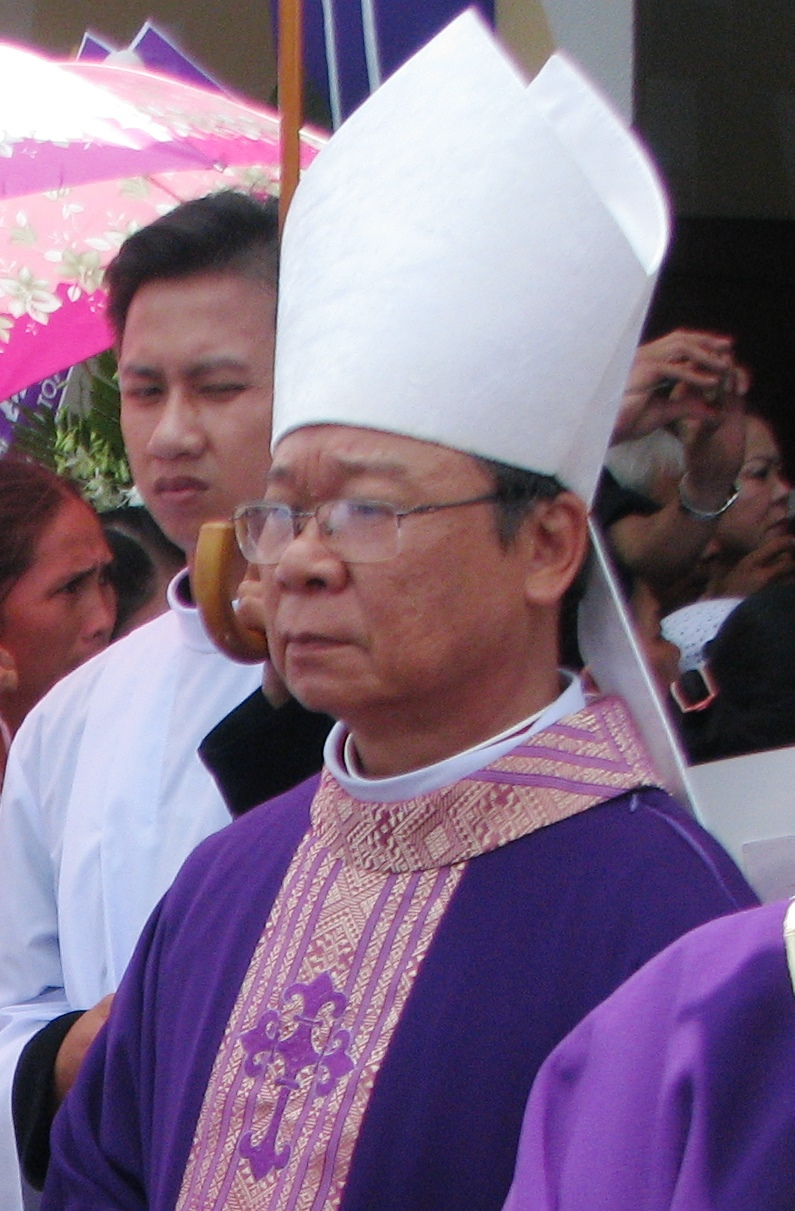 Giám mục Tri Bửu Thiên, giám mục Cần Thơ